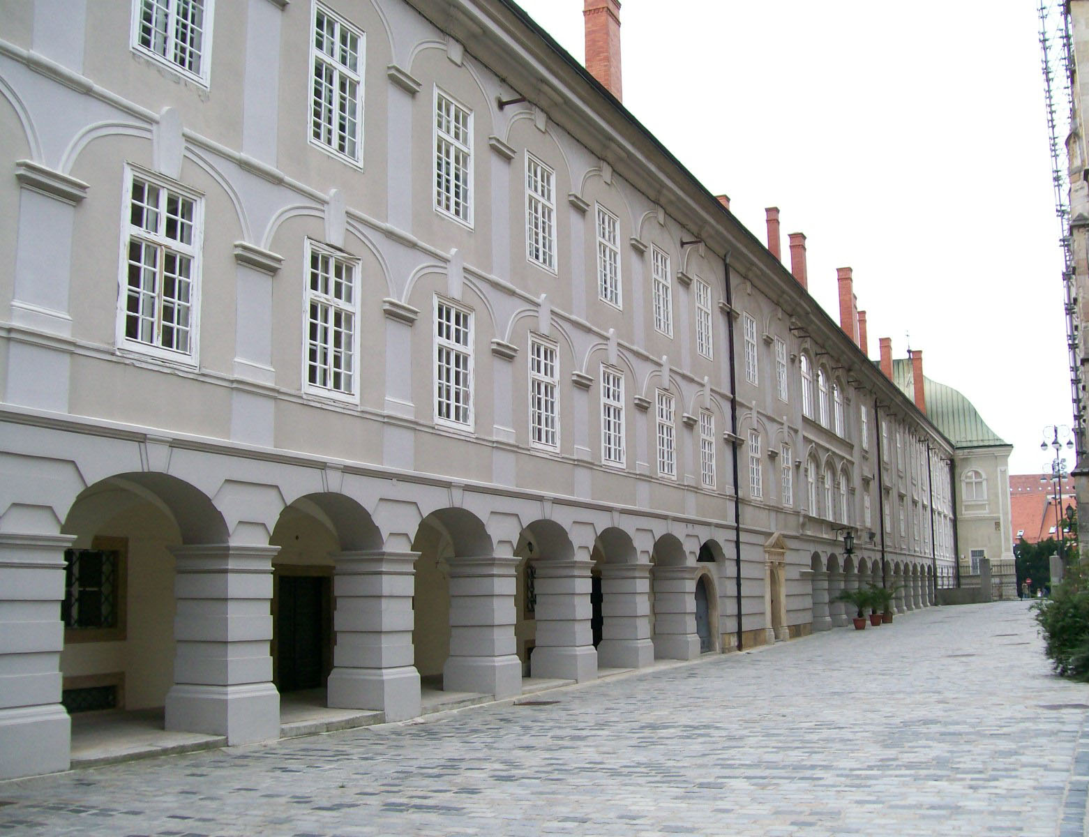 Nadbiskupski dvor u Zagrebu